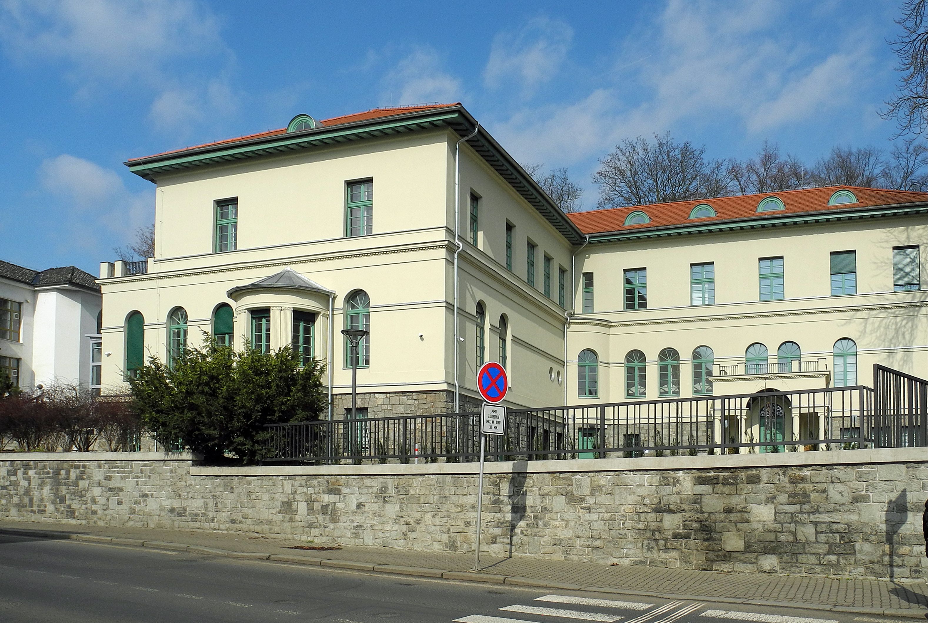 Gebäude in Aussig - Ústí nad Labem, Velká Hradební 1743/49 - ehem. Villa Carl Hermann Wolfrum, jetzt Nordböhmische Wissenschaftliche Bibliothek